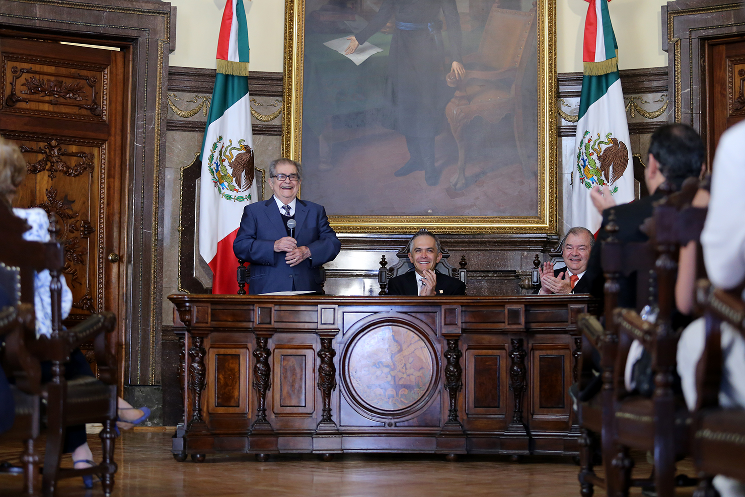 Entrega de reconocimiento como ciudadano distinguido al Dr. Miguel León-Portilla